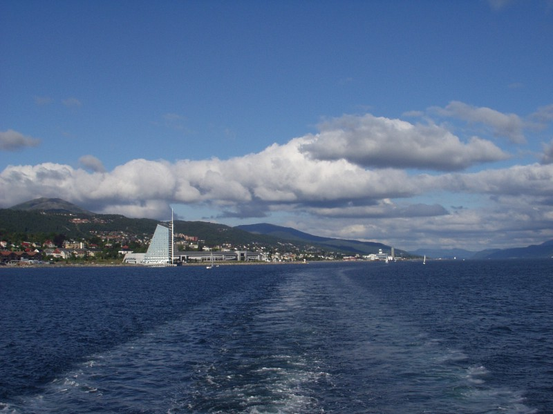 Description: Molde von der Fähre nach Vestnes Capture date: 2005-08-13 Photographer: sgm